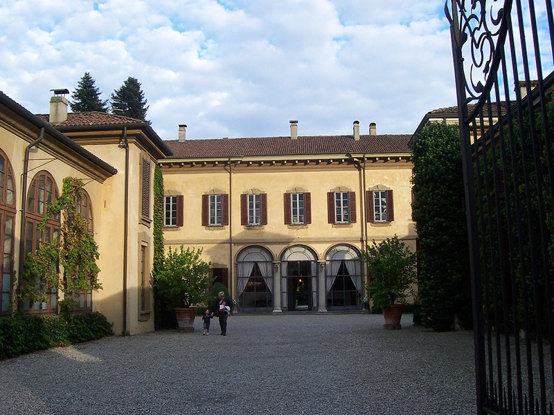 Canonica Lambro - Villa Taverna